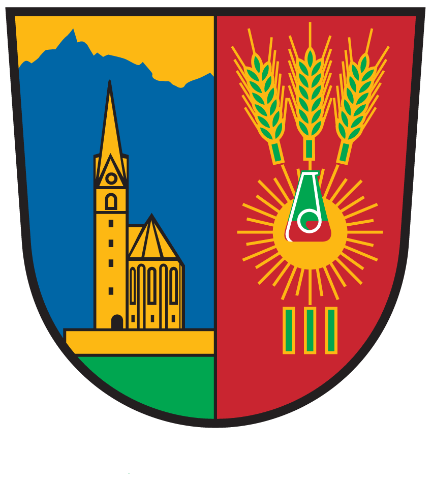 Wappen von Heiligenblut